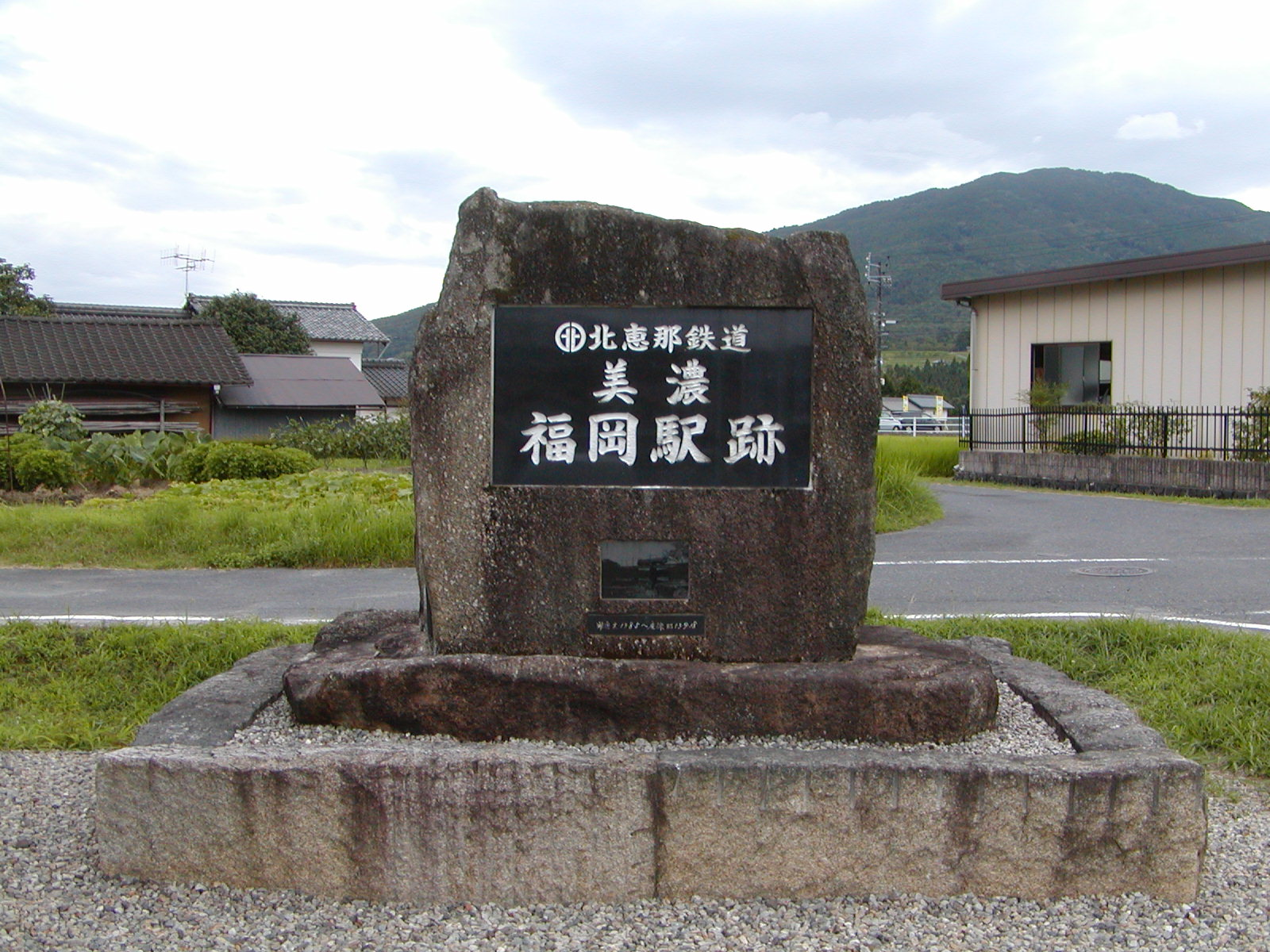 北恵那鉄道北恵那鉄道線美濃福岡駅跡に建てられた記念碑